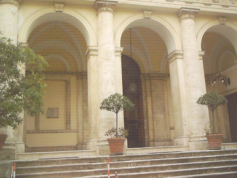 Ingresso del museo dell'istituto per la patologia del libro